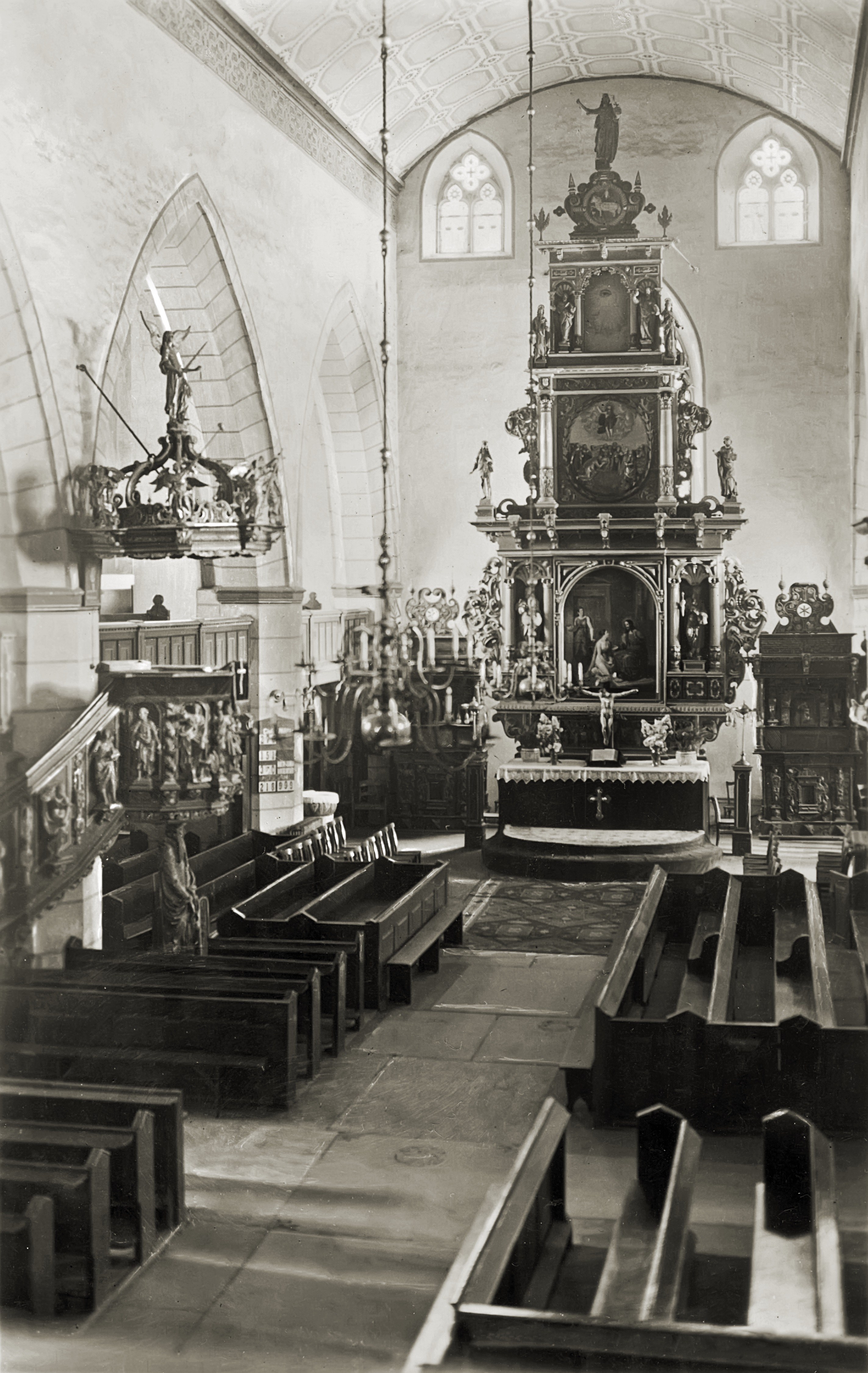 Innenraum der Deutschen Kirche in Tilsit